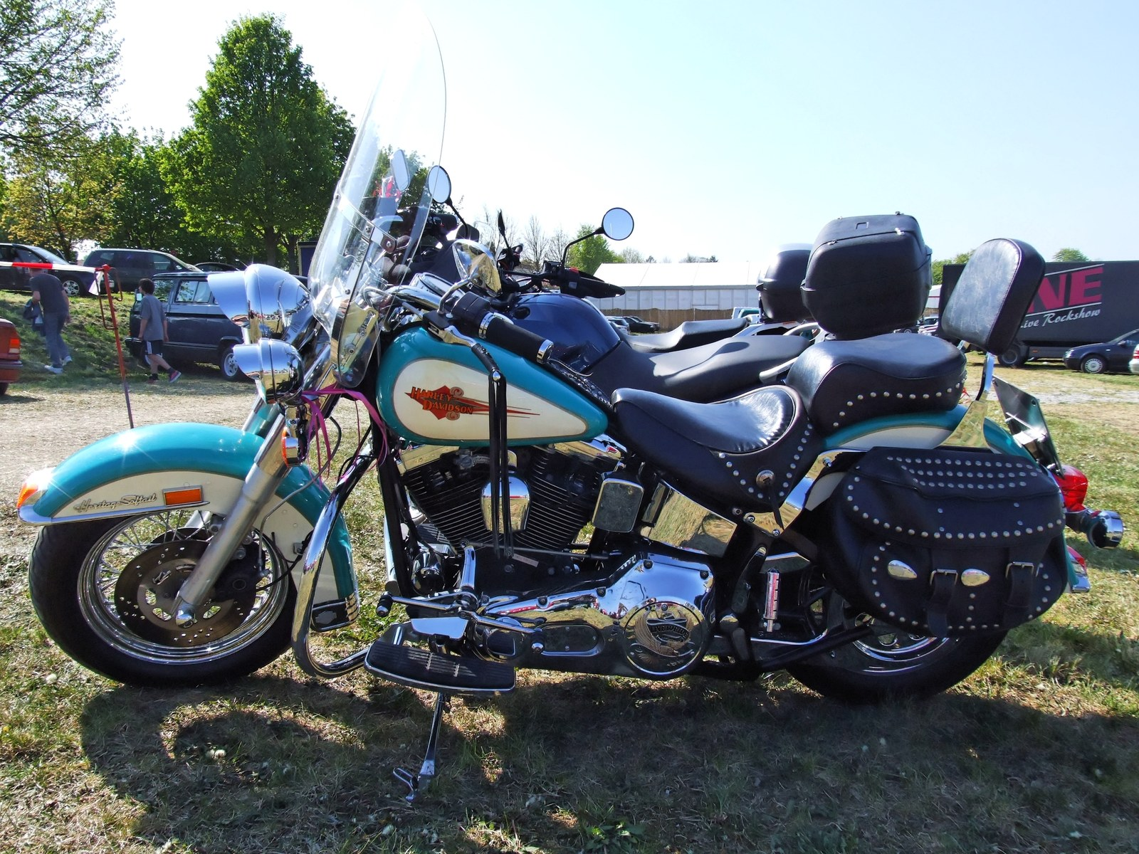 Quelle: selbst fotografiert, 04/2007 Fotograf: Späth Chr.